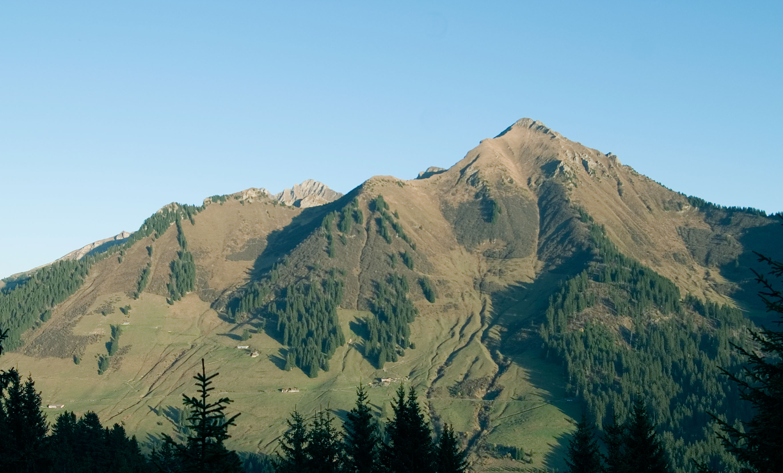 Pic Chaussy dans les Alpes bernoises, canton de Vaud, Suisse